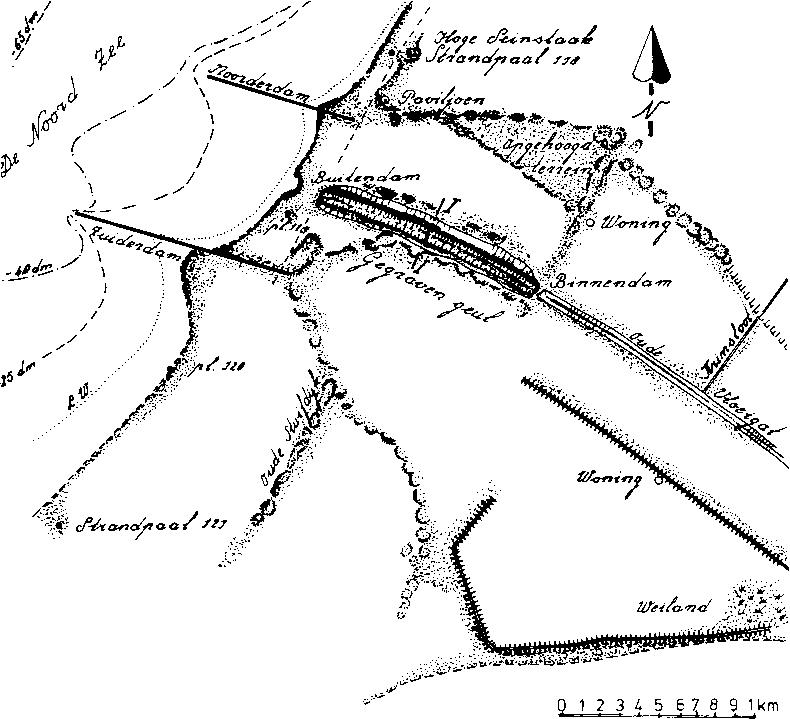 Bron: "Dienst Waterstaet"